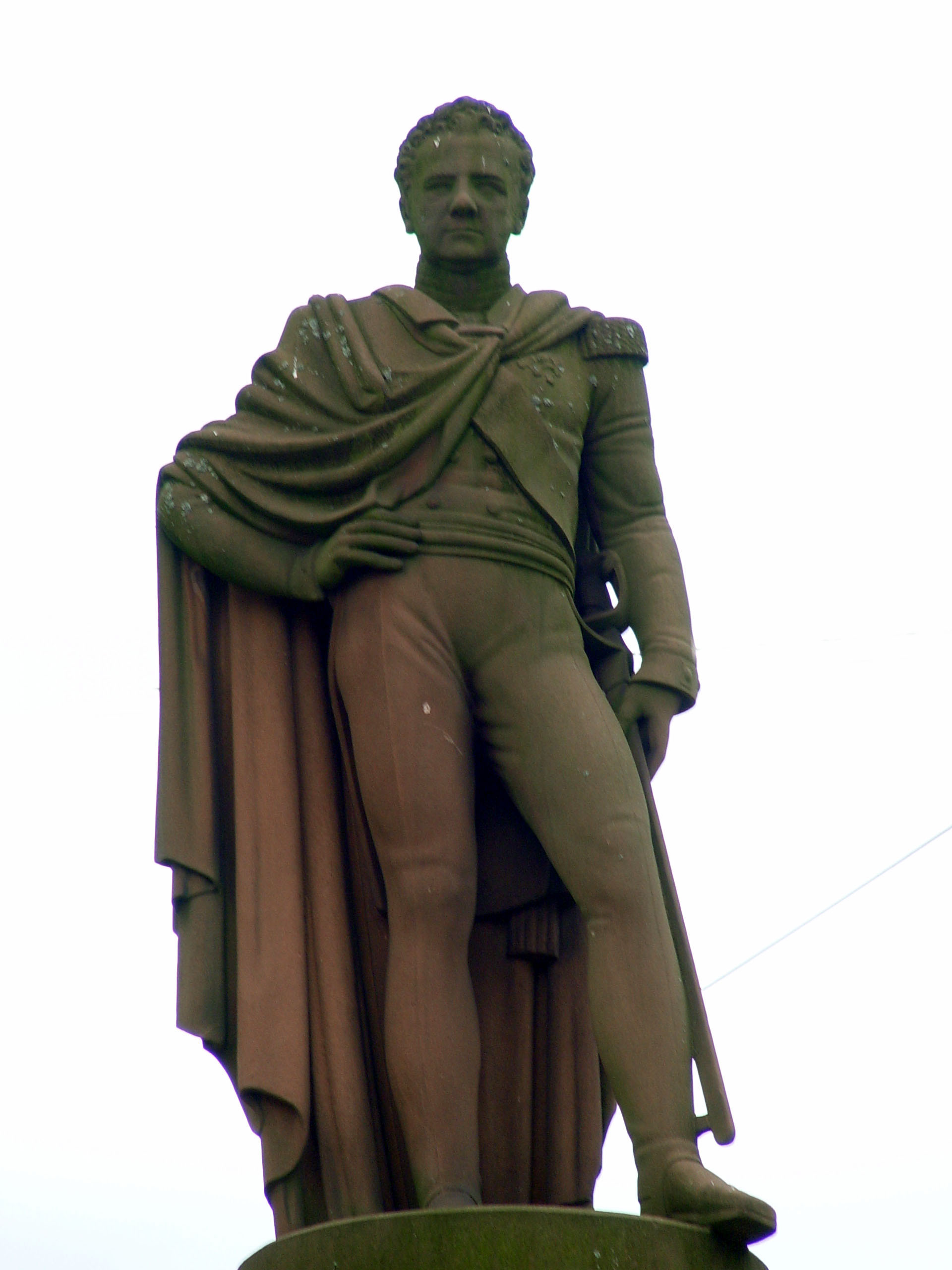 Grossherzog Ludwig von Baden, auf dem Brunnen vor dem Karlsruher Rathaus. Kopie eines zerstörten Originals von Aloys Raufer